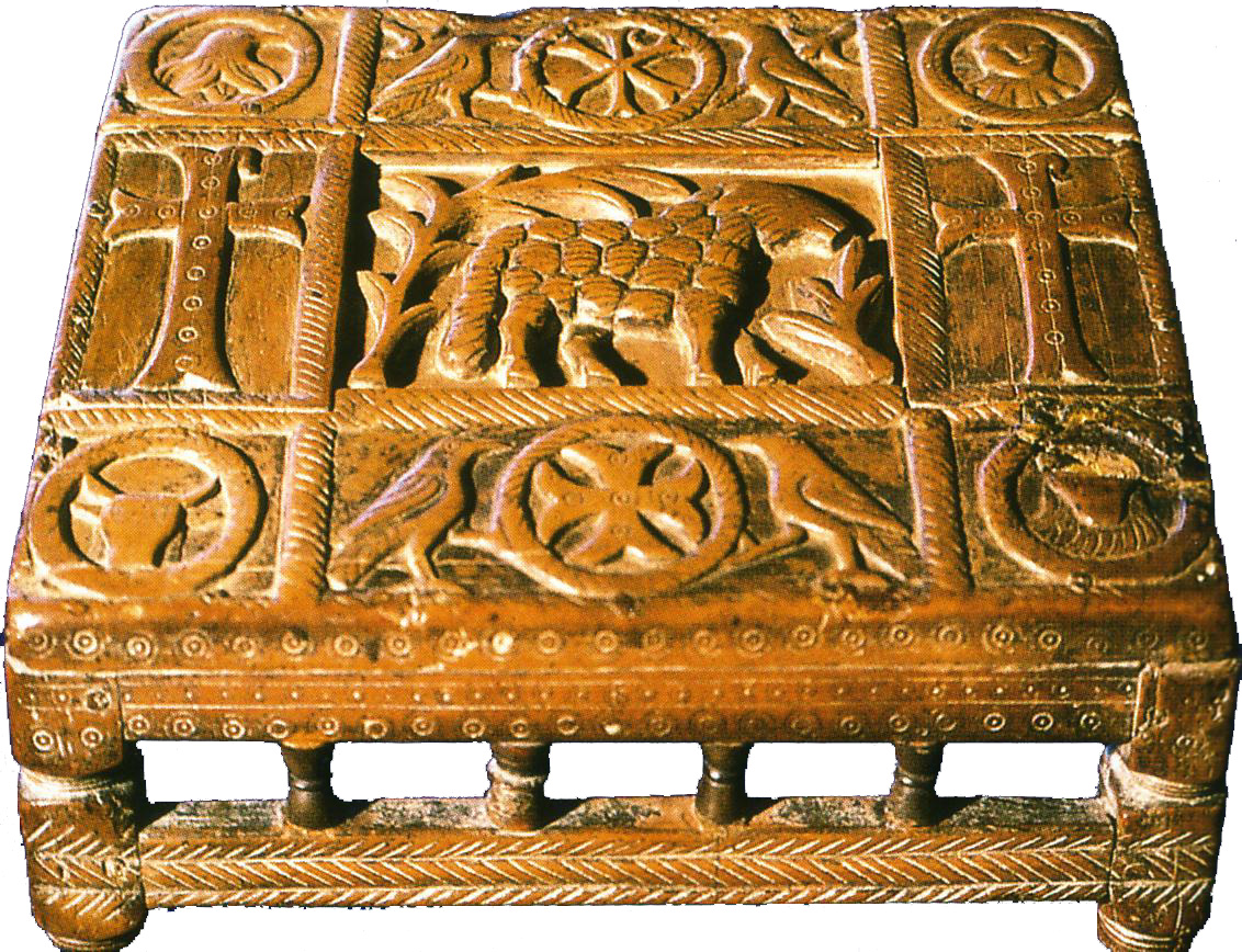 Pupitre de bois dit de sainte Radegonde conservé à l'abbaye Sainte-Croix, musée de Poitiers. L'agneau, image du Christ, représenté en son centre et encadré des symboles des quatre évangélistes, des croix monogrammatiques, ainsi que des bandeaux avec le chrisme et la croix pattée accostés de colombes.